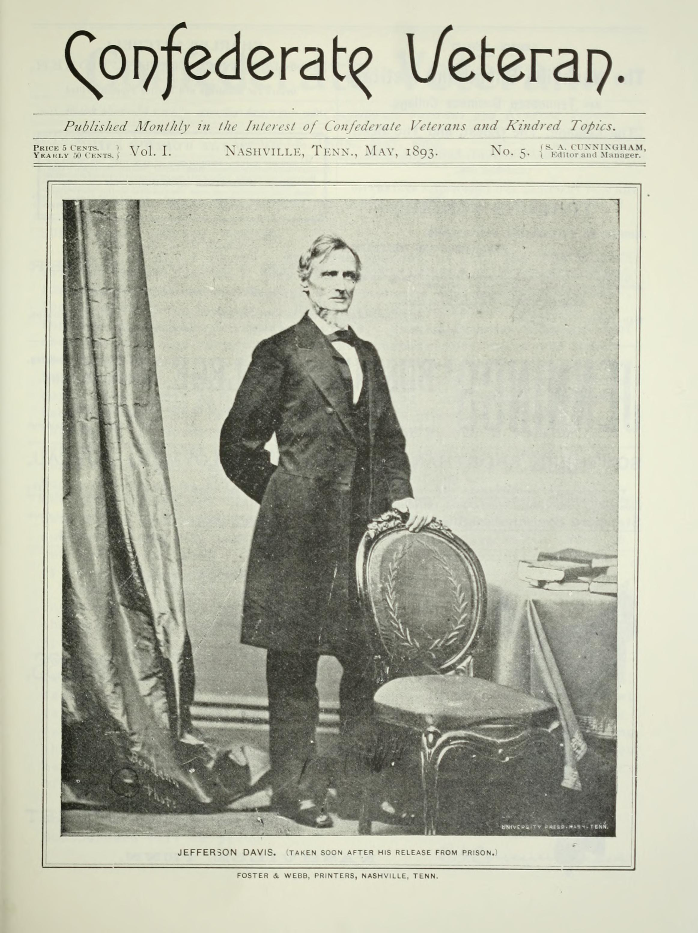 Confederate Veteran cover, Vol. I, No. 5.